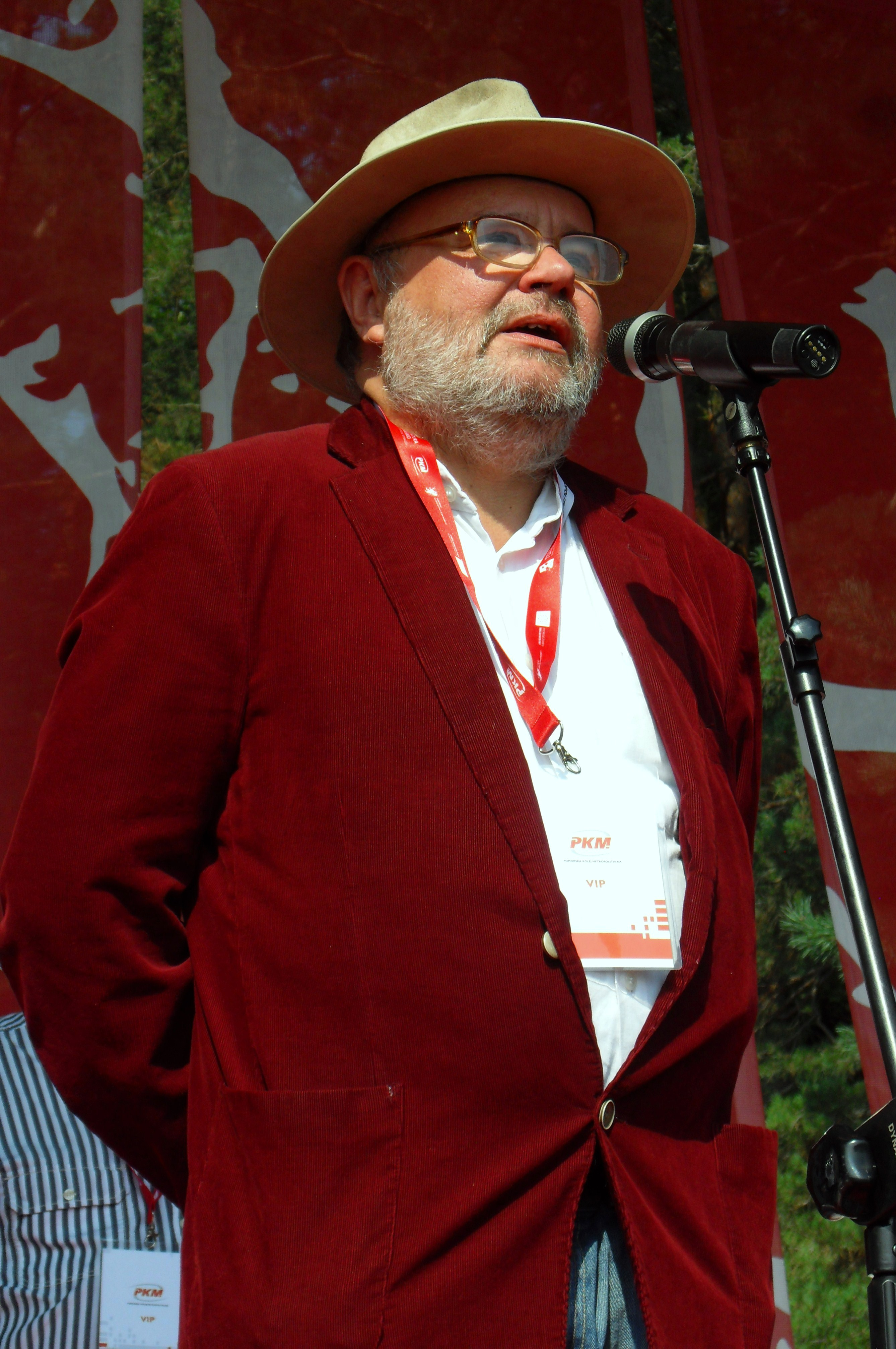 Paweł Huelle, pisarz i nauczyciel.